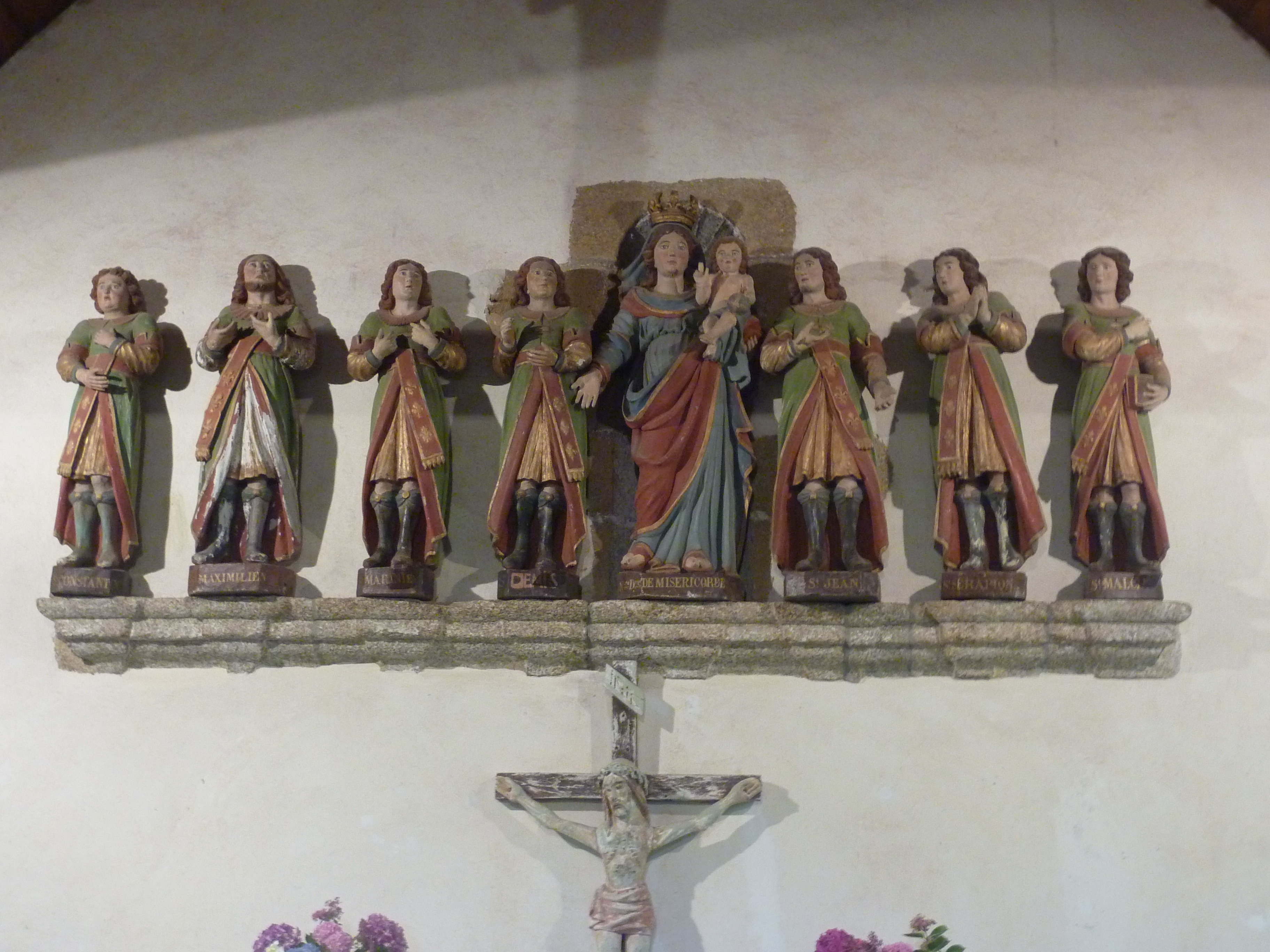 Sept-Saints (Vieux-Marché) : les sept Saints (statues du XVIIIe siècle) dans le choeur de la chapelle